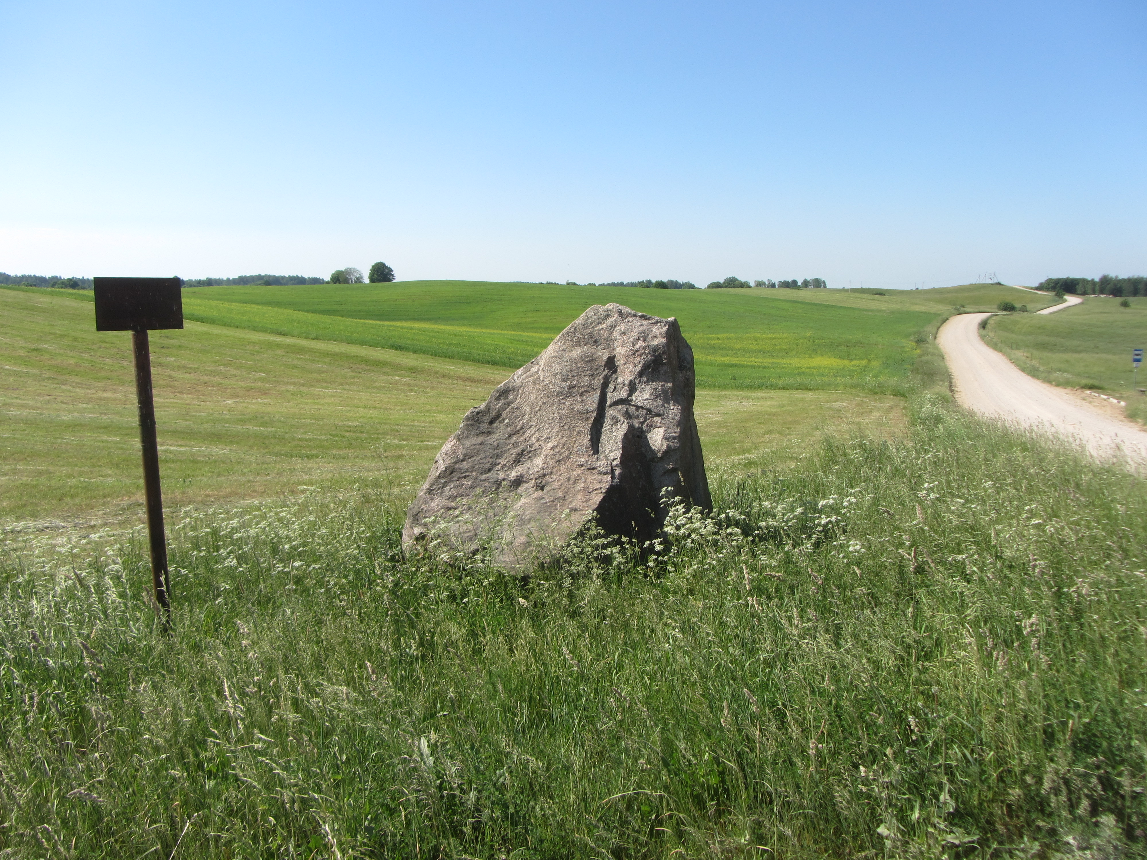 Nemaitonių sen., Lithuania